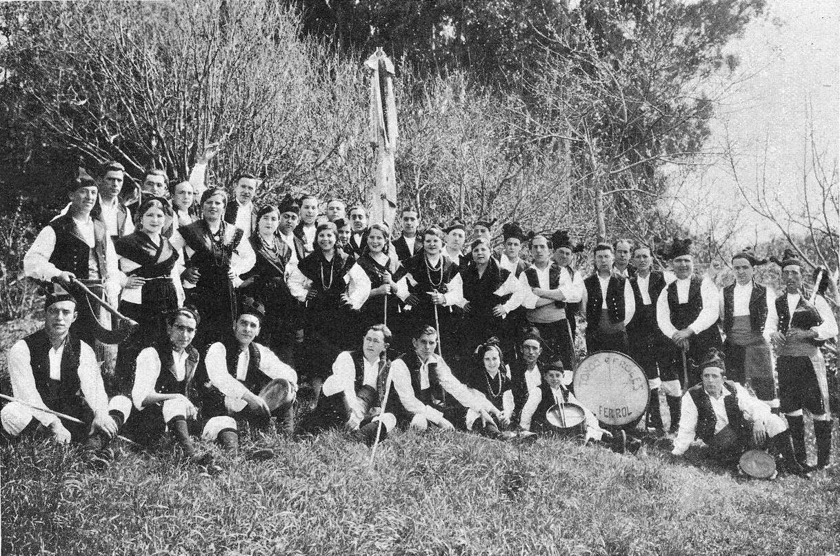 Coro Toxos e Froles, fotografía en Vida Gallega 1934